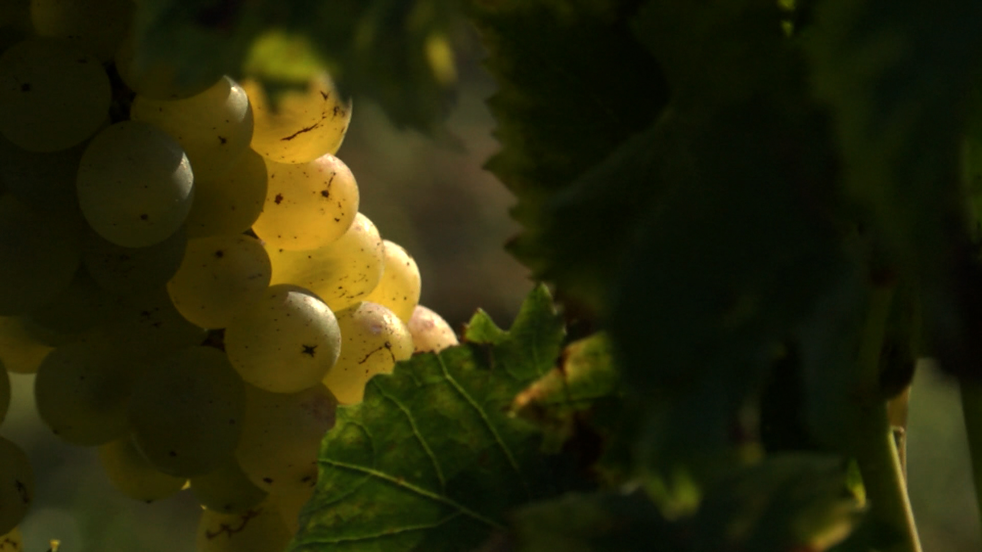 Grappolo di Nascetta